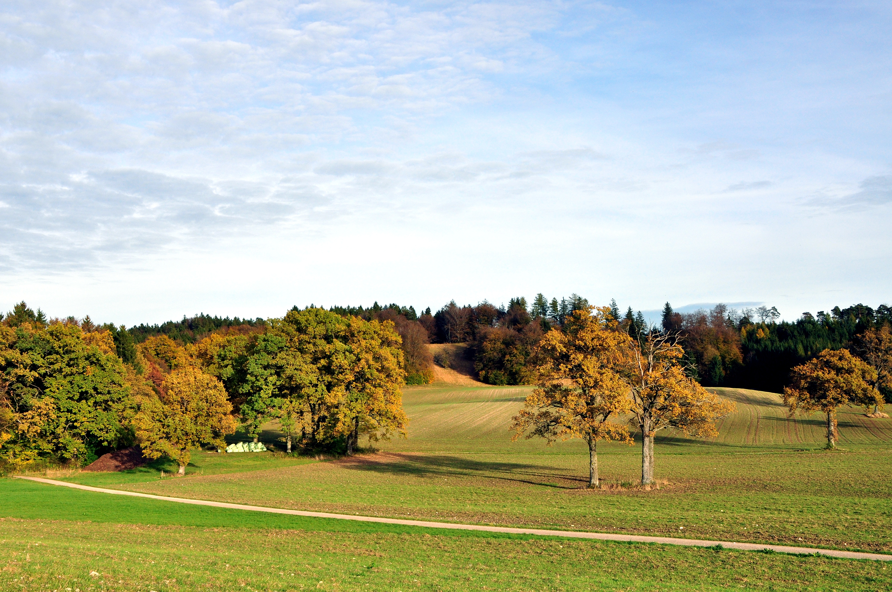 Andechs. Moräne aus der Würmeiszeit zwischen Andechs und Frieding.